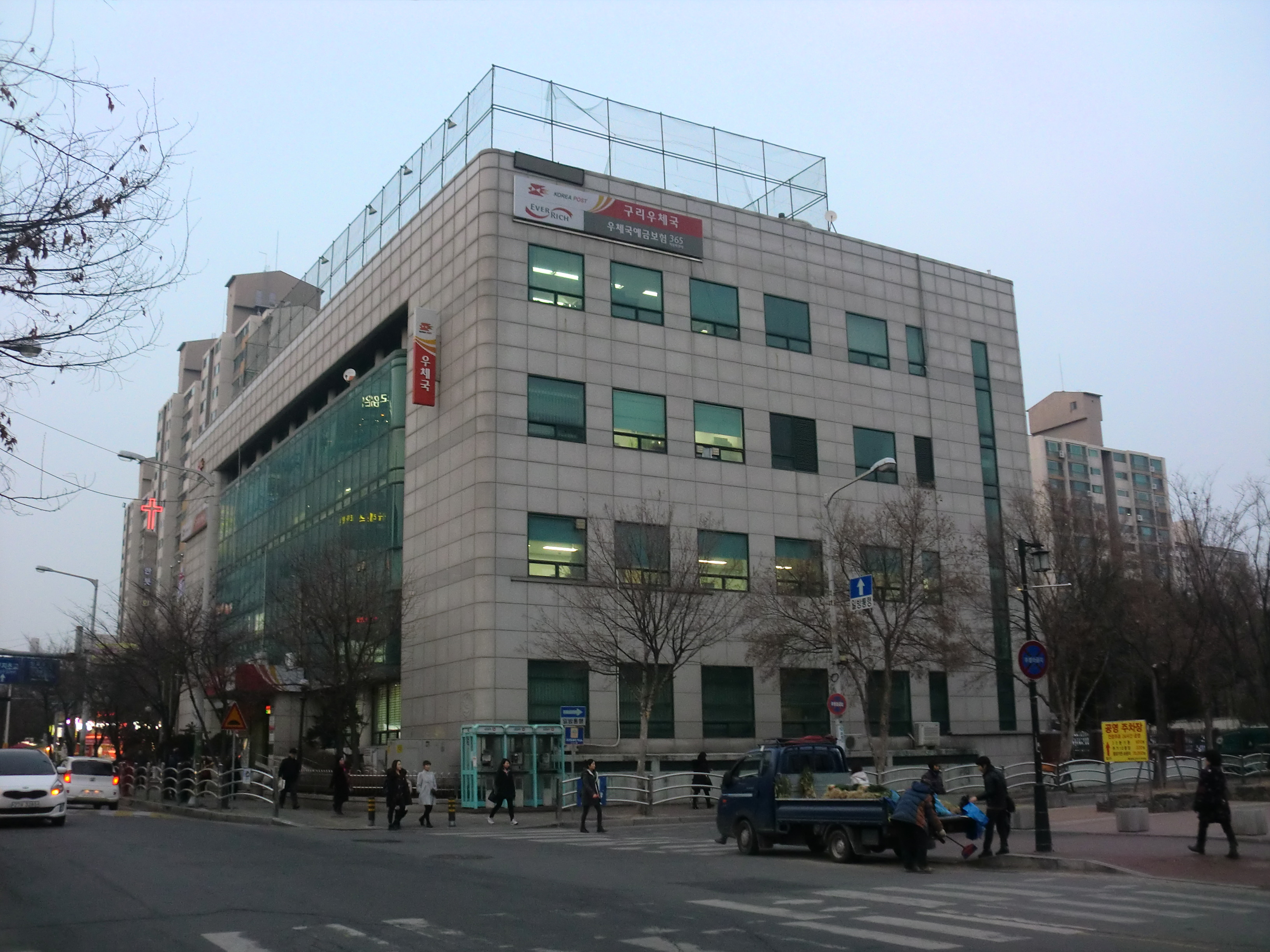 경기도 구리시에 있는 구리우체국